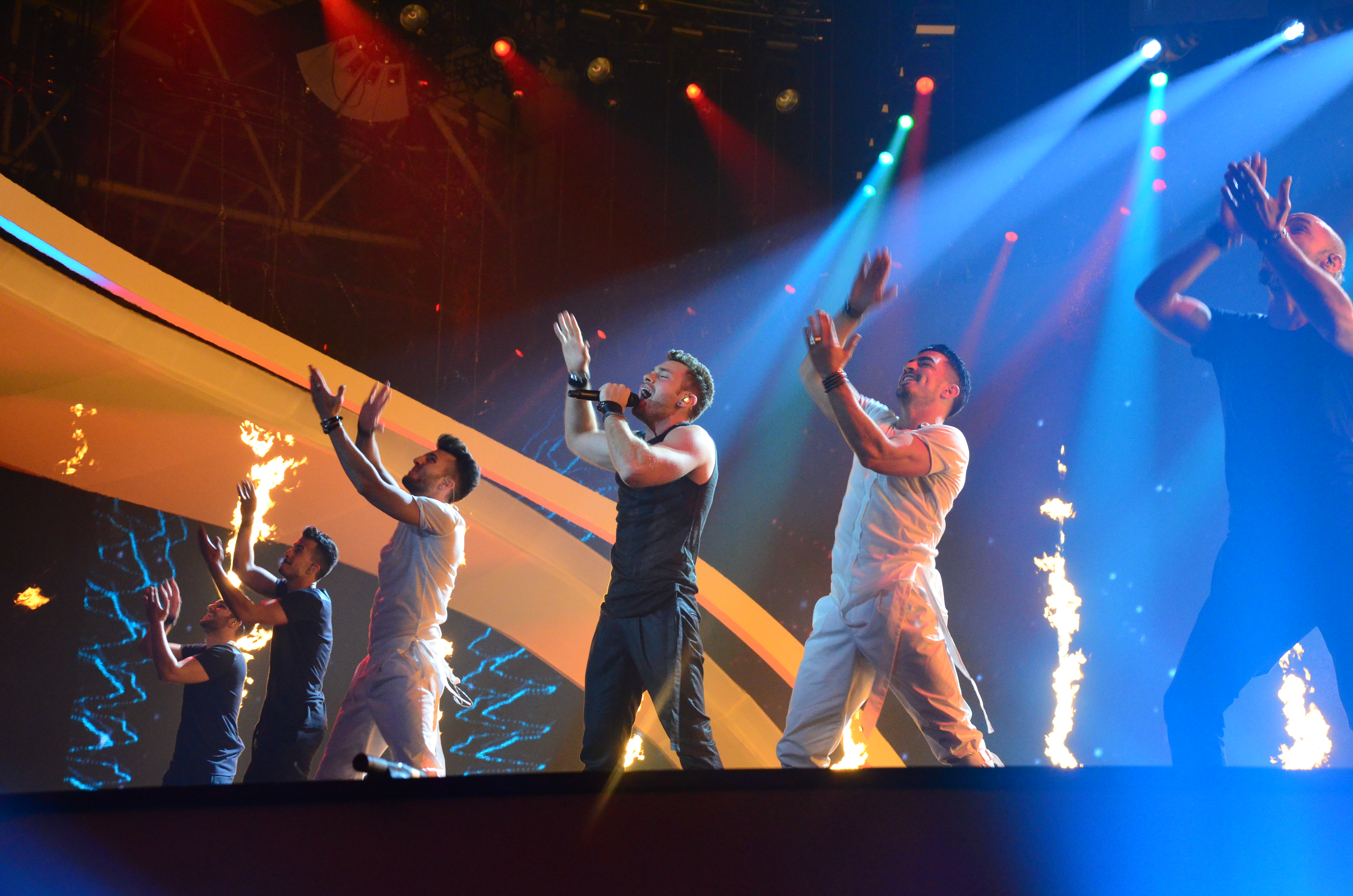 10 травня 2017 року у Києві відбулась генеральна репетиція 2 півфіналу "Євробачення".